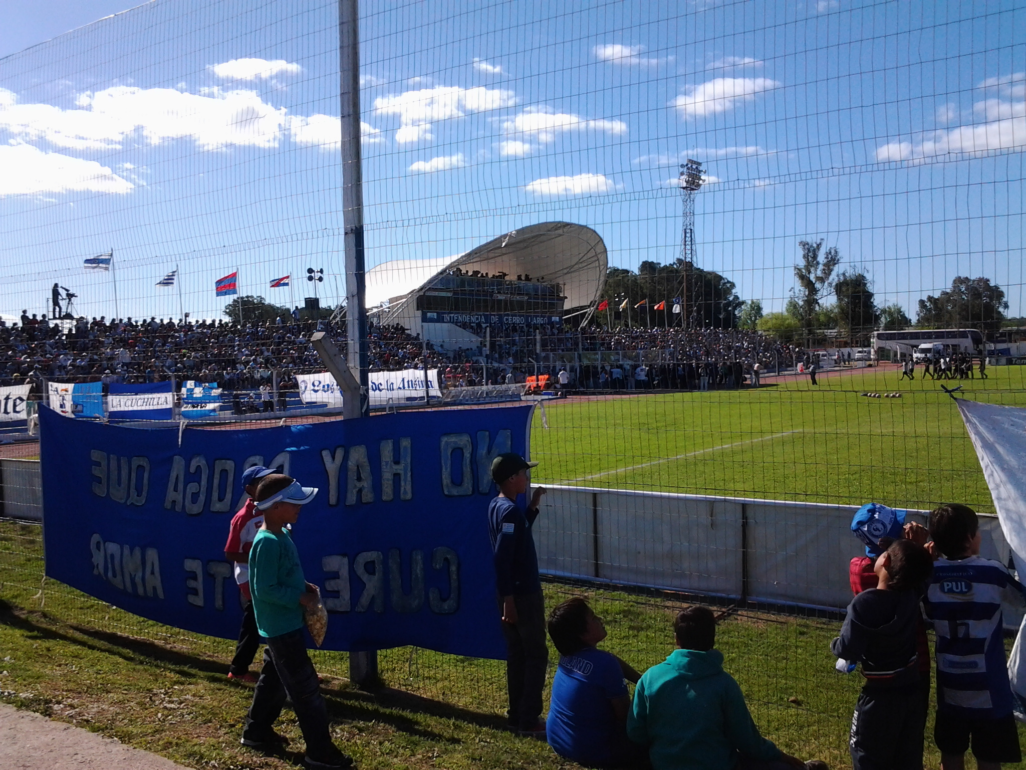 Tribuna principal del Estadio Ubilla de Melo en un partido entre Cerro Largo y Peñarol